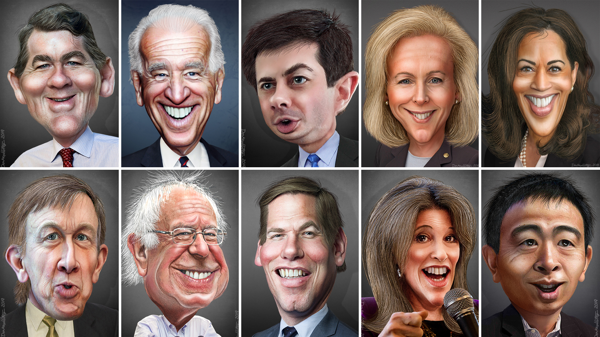 View original image attribution here: Michael Bennet Joseph Biden Peter Buttigieg Kirsten Gillibrand Kamala Harris John Hickenlooper Bernard Sanders Eric Swalwell Marianne Williamson Andrew Yang